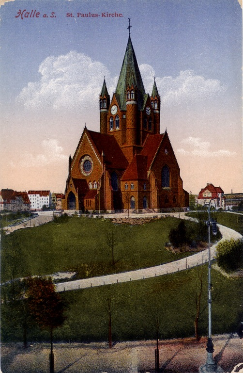 Couleurkarte des Hallenser Wingolf (ca. 1905), Motiv: Pauluskirche zu Halle